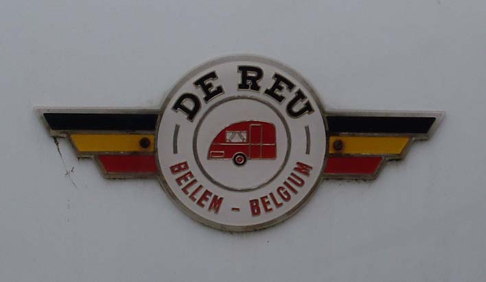 Detail op een old-timer - Caravan De Reu - België